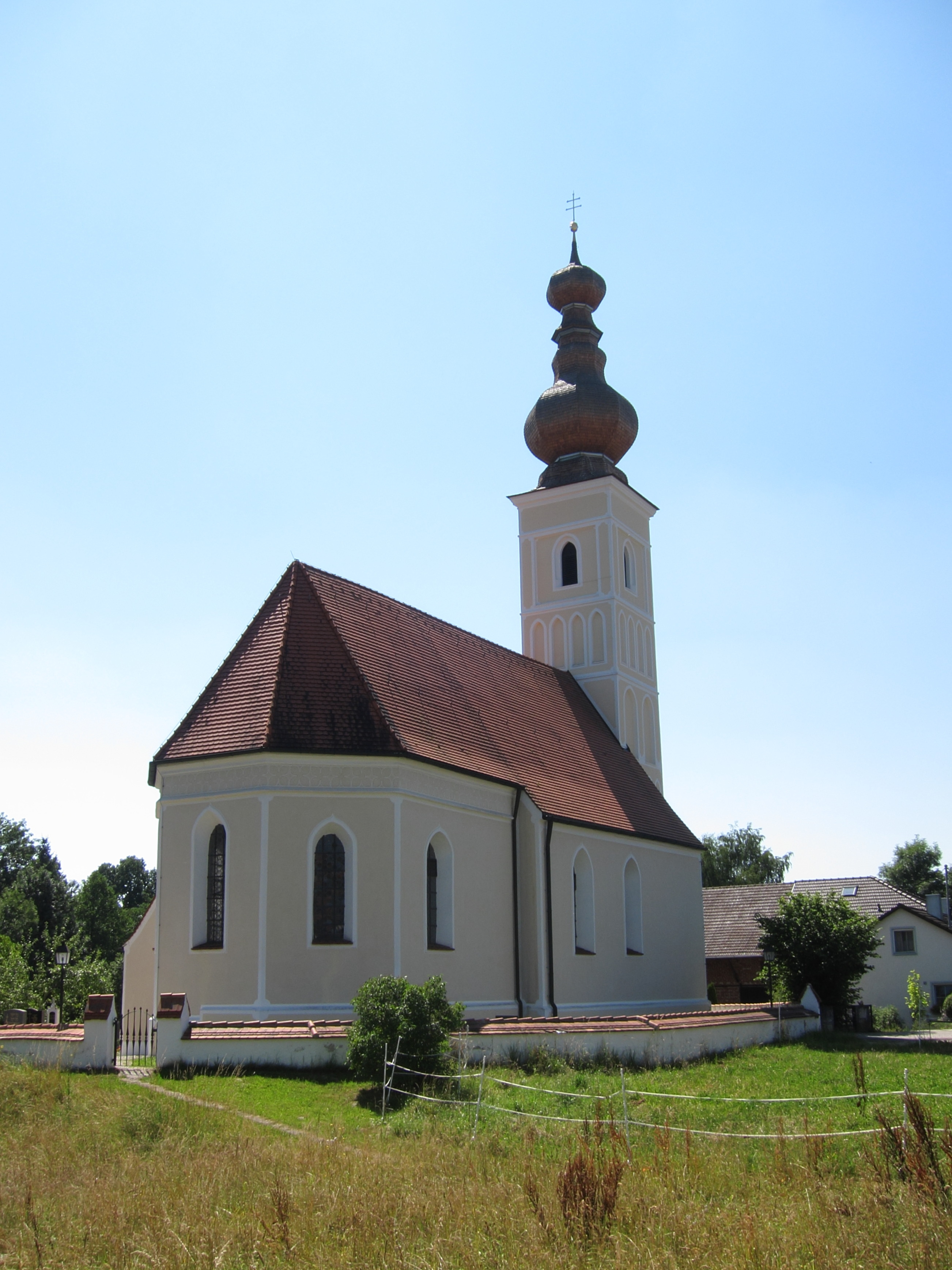 Esterndorf 23; katholische Filialkirche St. Leonhard, Saalbau mit eingezogenem Polygonalchor, angefügter Sakristei und Westturm mit Spindelhaube, spätgotisch um 1500, Langhaus im Kern älter.